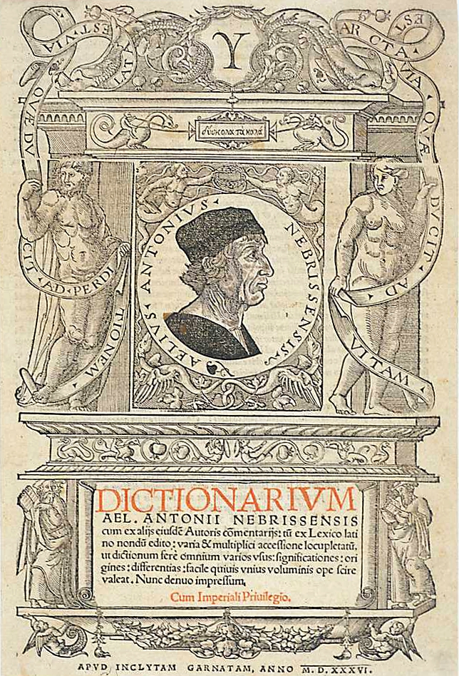 Frontis del "Dictionarium" de Antonio de Nebrija en la edición impresa en Granada en 1536 por sus hijos. Xilografía atribuida a Antonio Ramiro, natural de Écija, grabador principal de la imprenta de los hijos de Nebrija